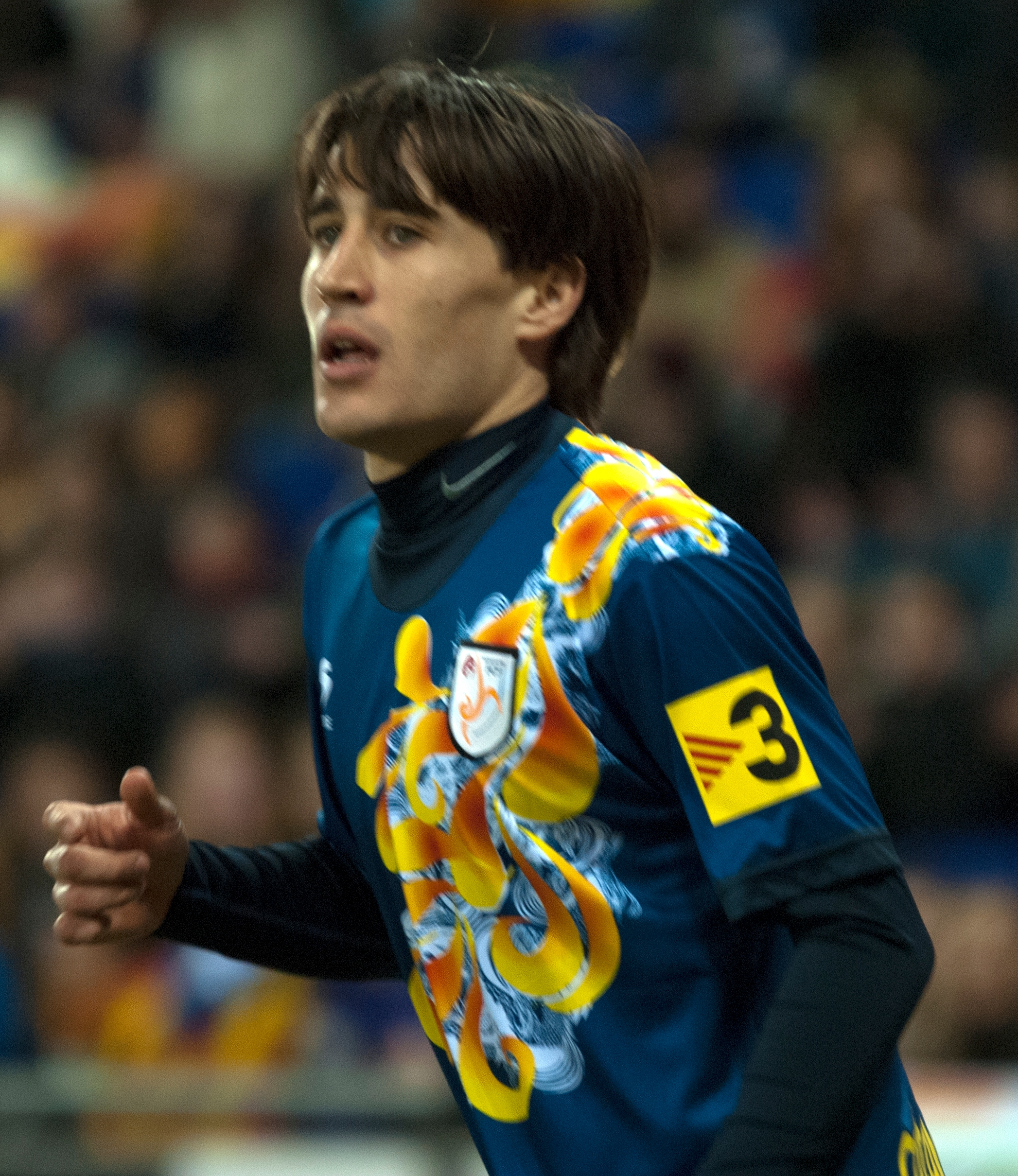 Bojan Krkiç jugant amb Catalunya.